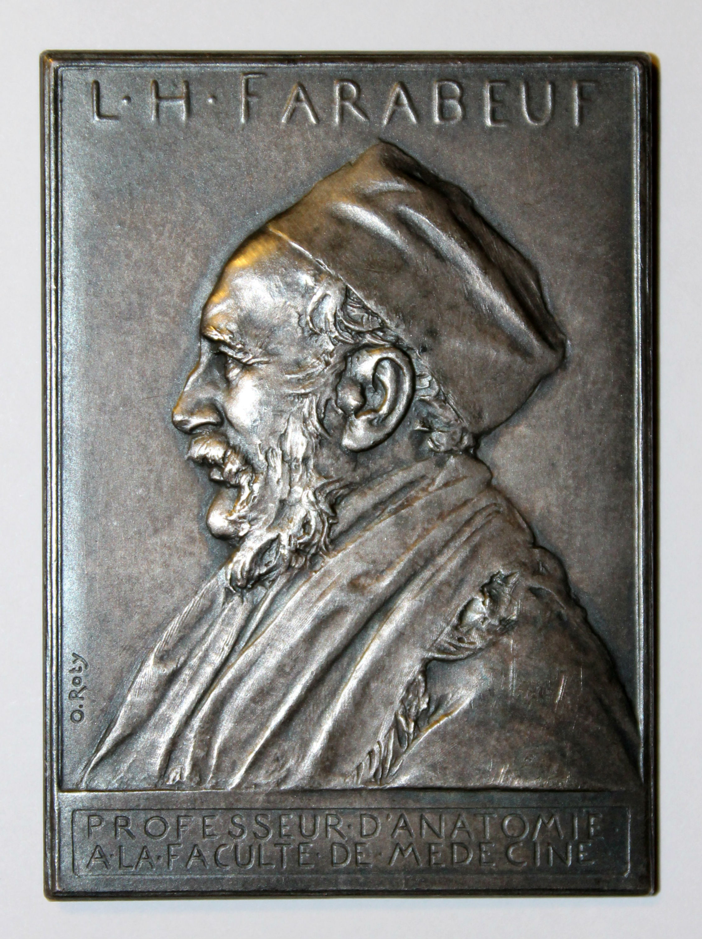 Médaille rectangulaire (61x43mm) de Louis Hubert Farabeuf (1841-1910), professeur d'anatomie à la faculté de médecine, réalisée par le graveur Oscar Roty en 1899. (Collection personnelle)